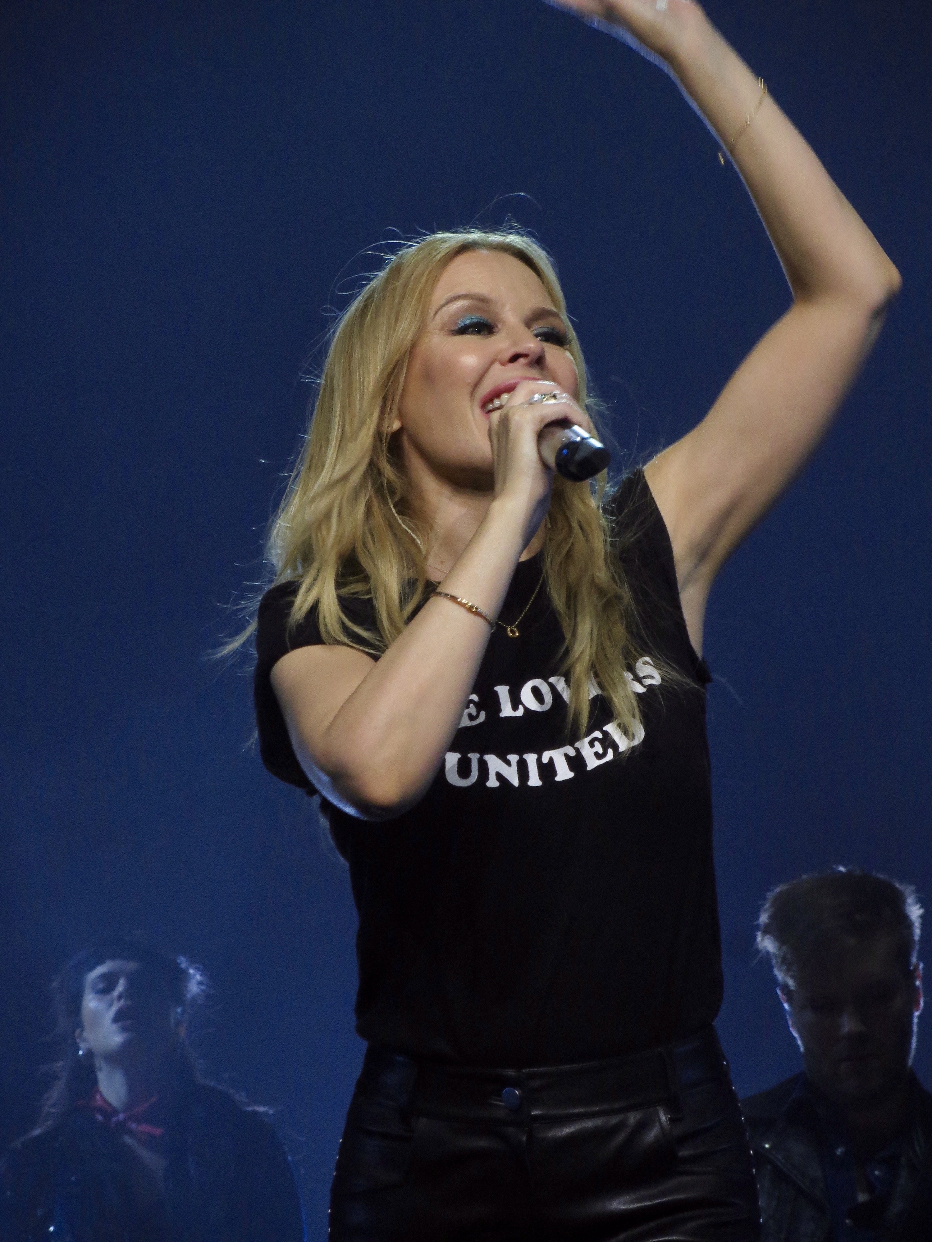 Kylie Minogue 7